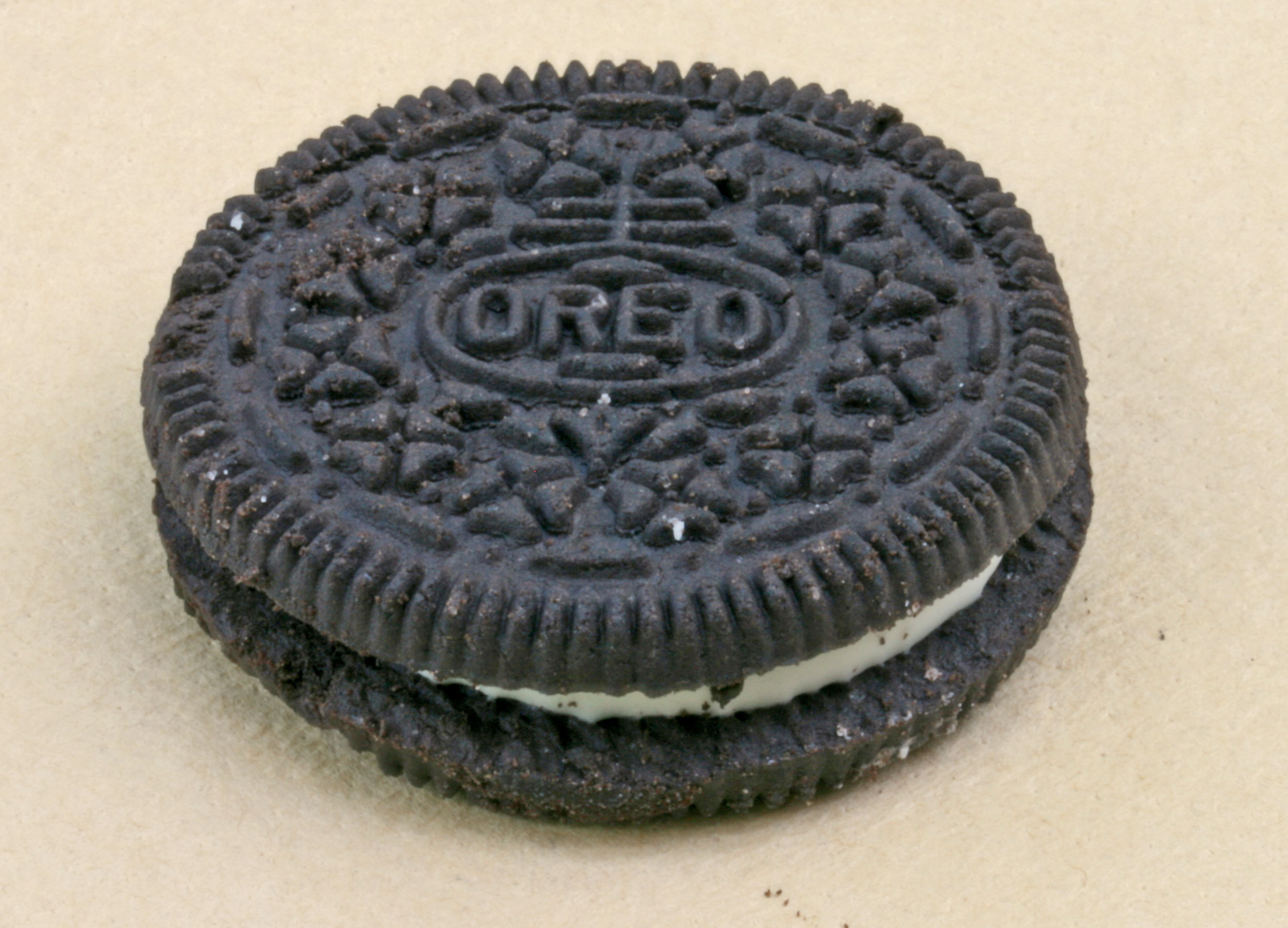 Sujet:En Oreo Source:Eege Foto vum User:Cornischong